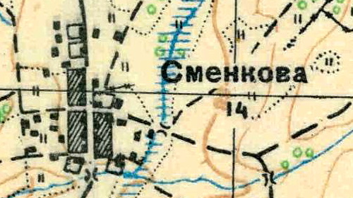 Топографическая карта Ленинградской области, квадрат О-35-9-Г-г (Косколово), деревня Сменково